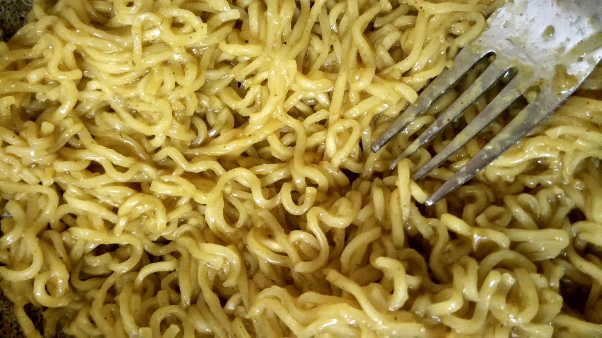 சேலத்து நூடுல்சு.